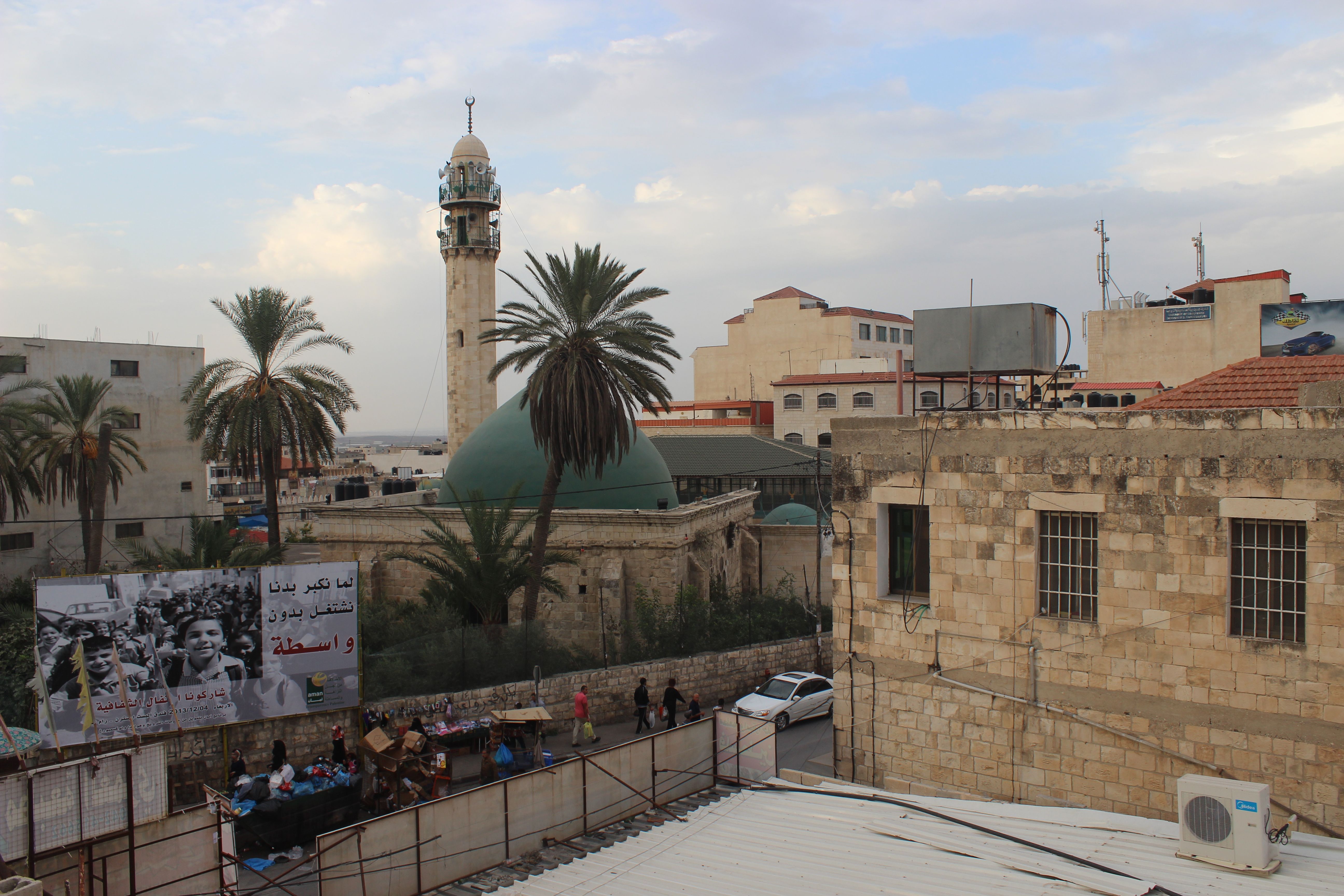 الجامع الكبير في جنين